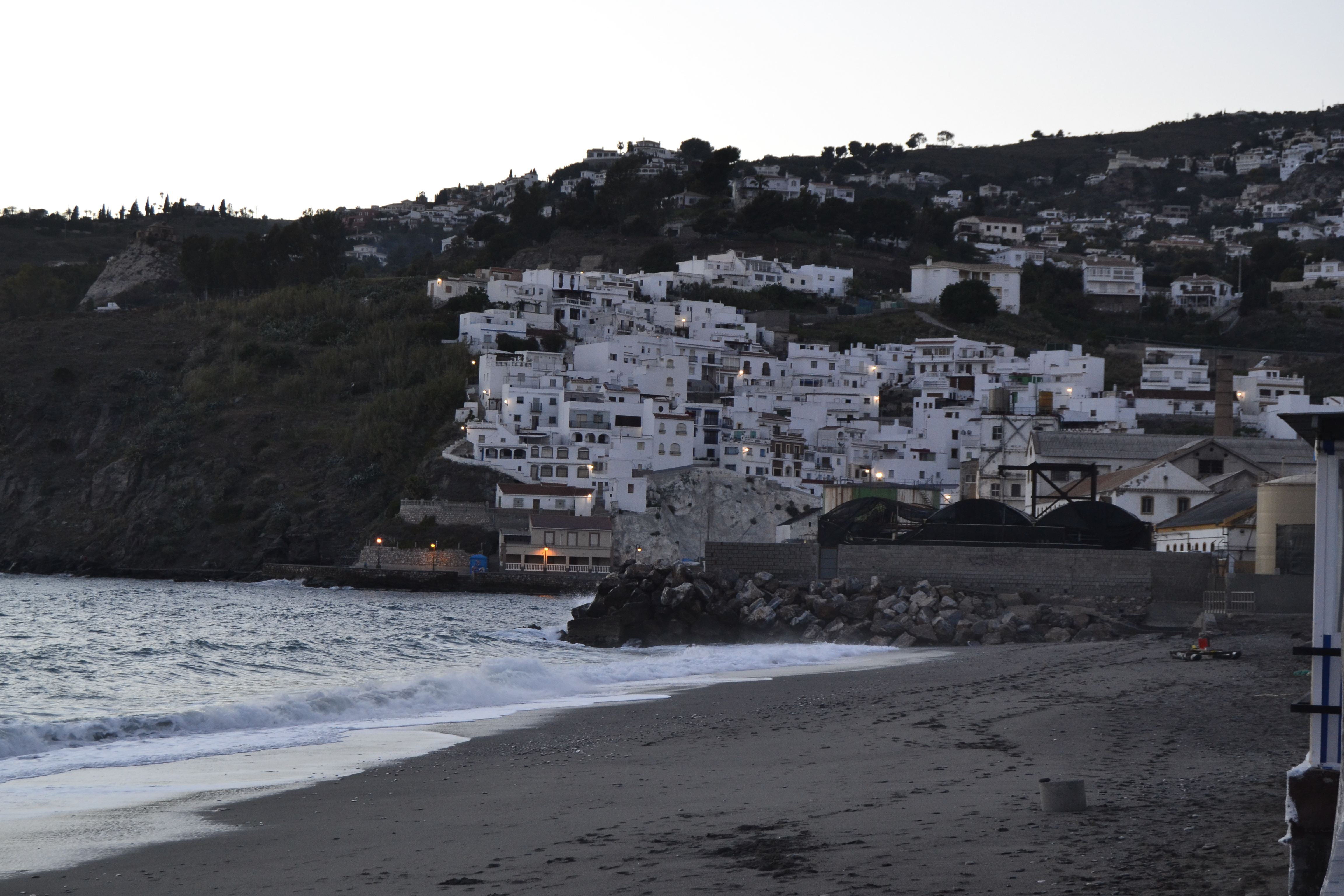 Playa de la Caleta. Salobreña. Marzo de 2014